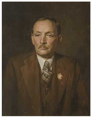 Партрэт Янкі Купалы з малюнка, зробленага з натуры пры жыцці песняра (Валянцін Волкаў. 1945)